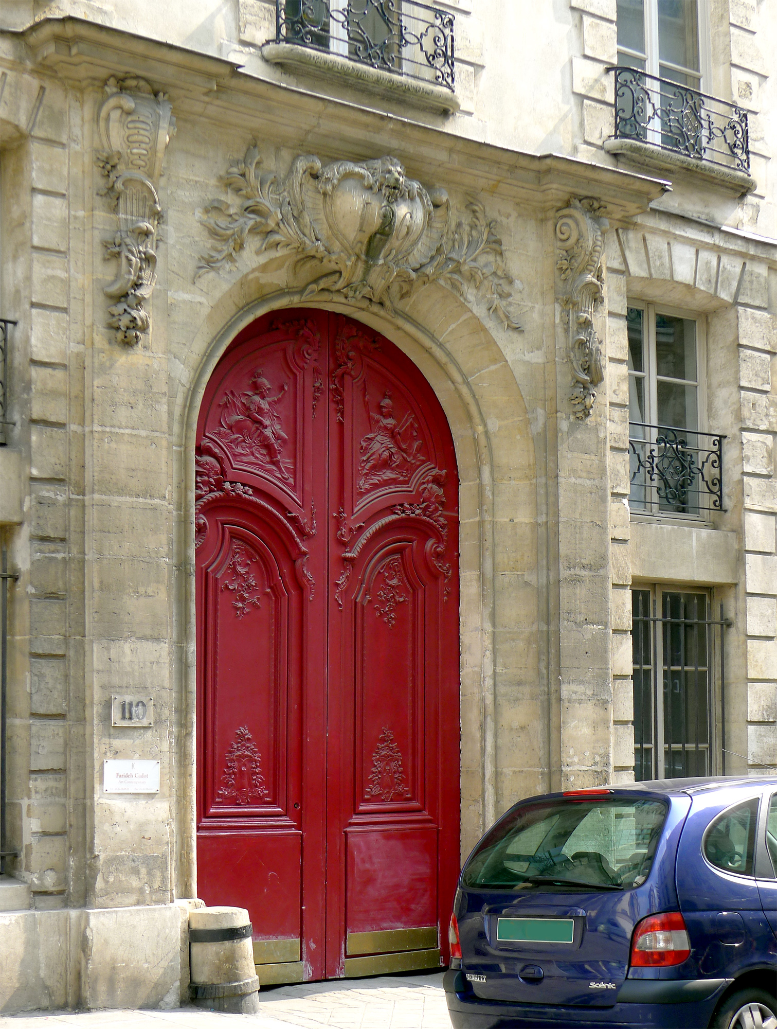 Hôtel d'Hozier, porte du 110 rue Vieille-du-Temple (Inscrit, 1987) .